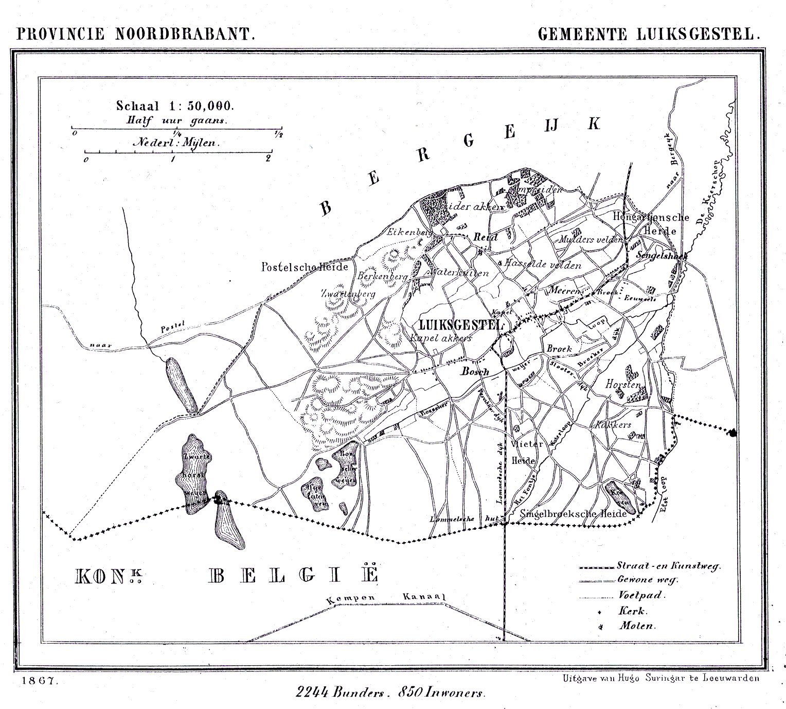 Nederland, Noord-Brabant, Gemeente Luikgestel